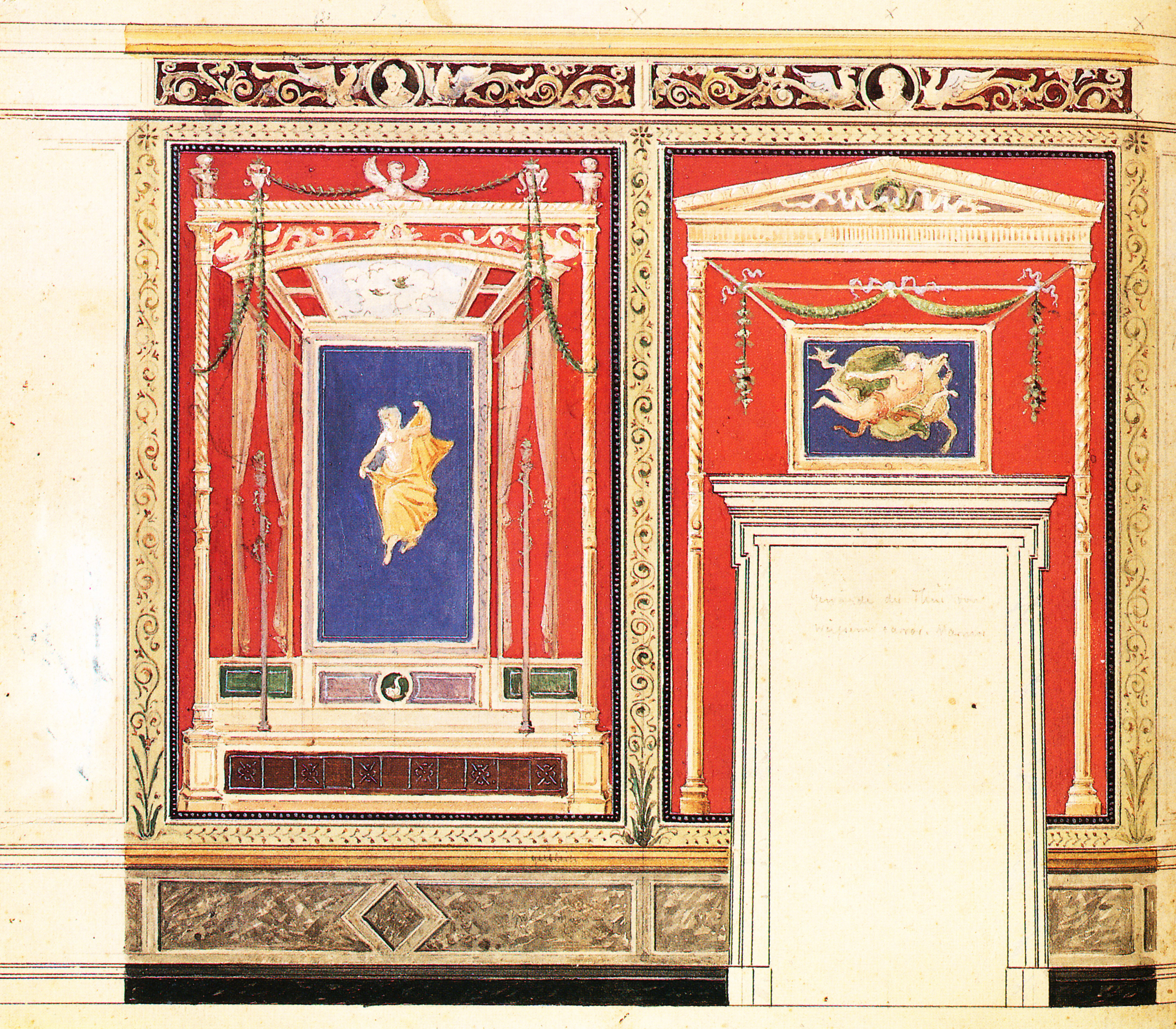 Ausmalungsentwurf der Loggia Alexandra von Alexander Gilli